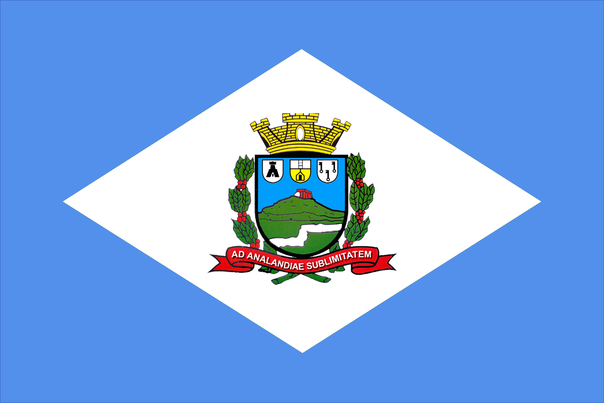 Bandeira do Município de Analândia